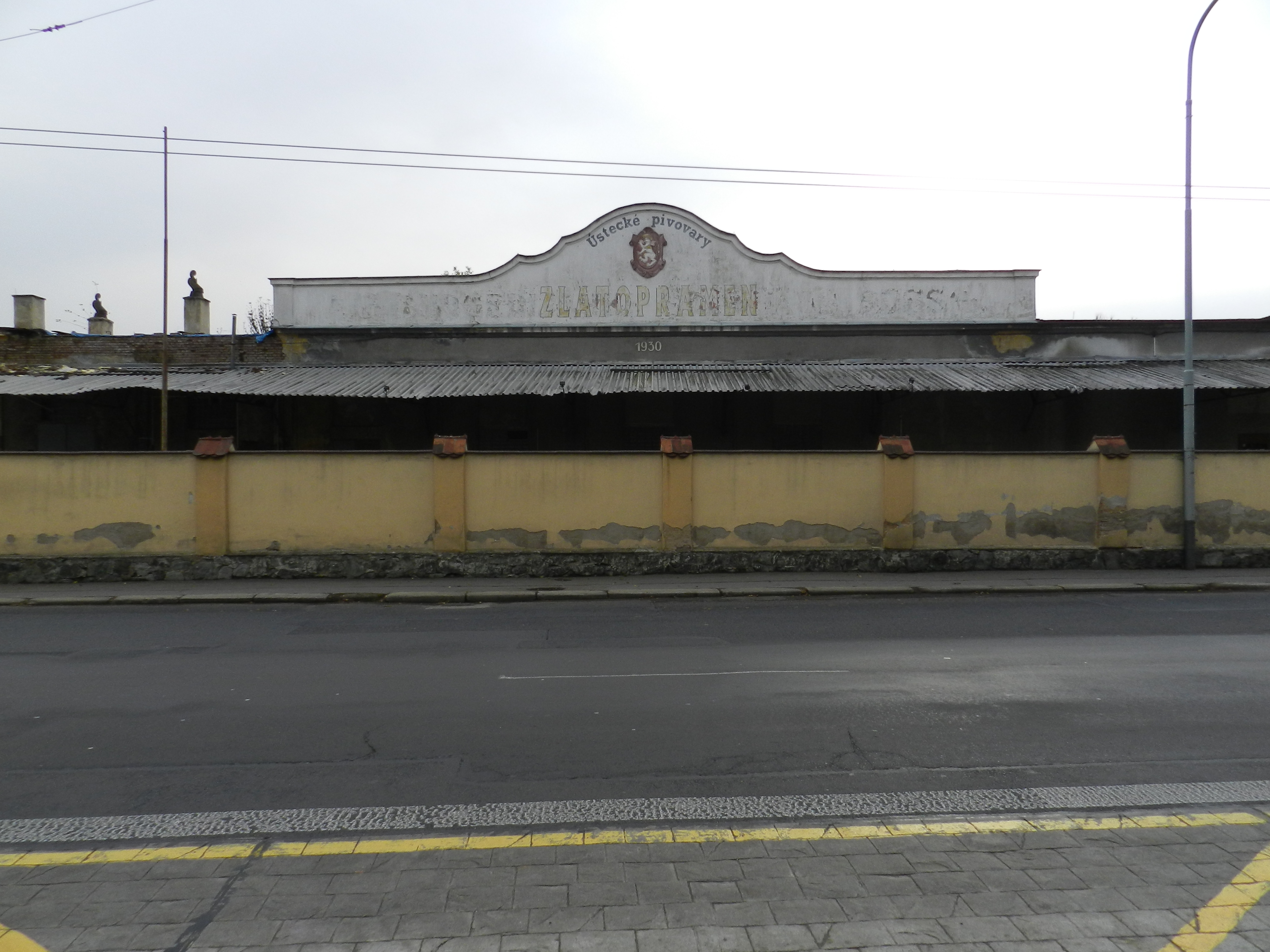 Ohradní zeď pivovaru v Ústí nad Labem, čtvrti Krásné Březno, za ní provozní budova s nízkým karnýzovým štítkem s městským znakem a s reklamním nápisem Ústecké pivovary Zlatopramen, pod ním datace 1930.